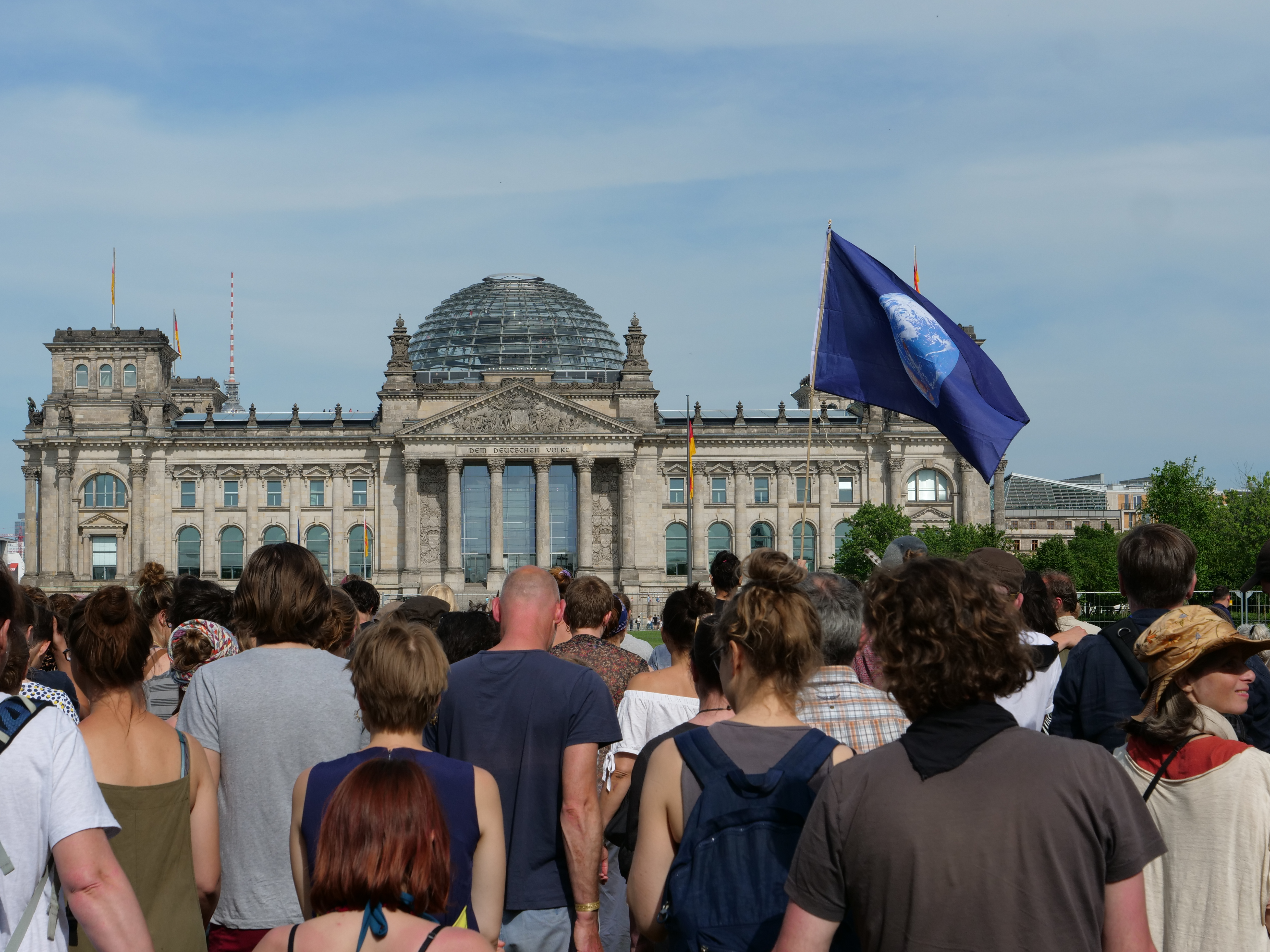 Ausrufung des zivilen Klimanotstands in Berlin.